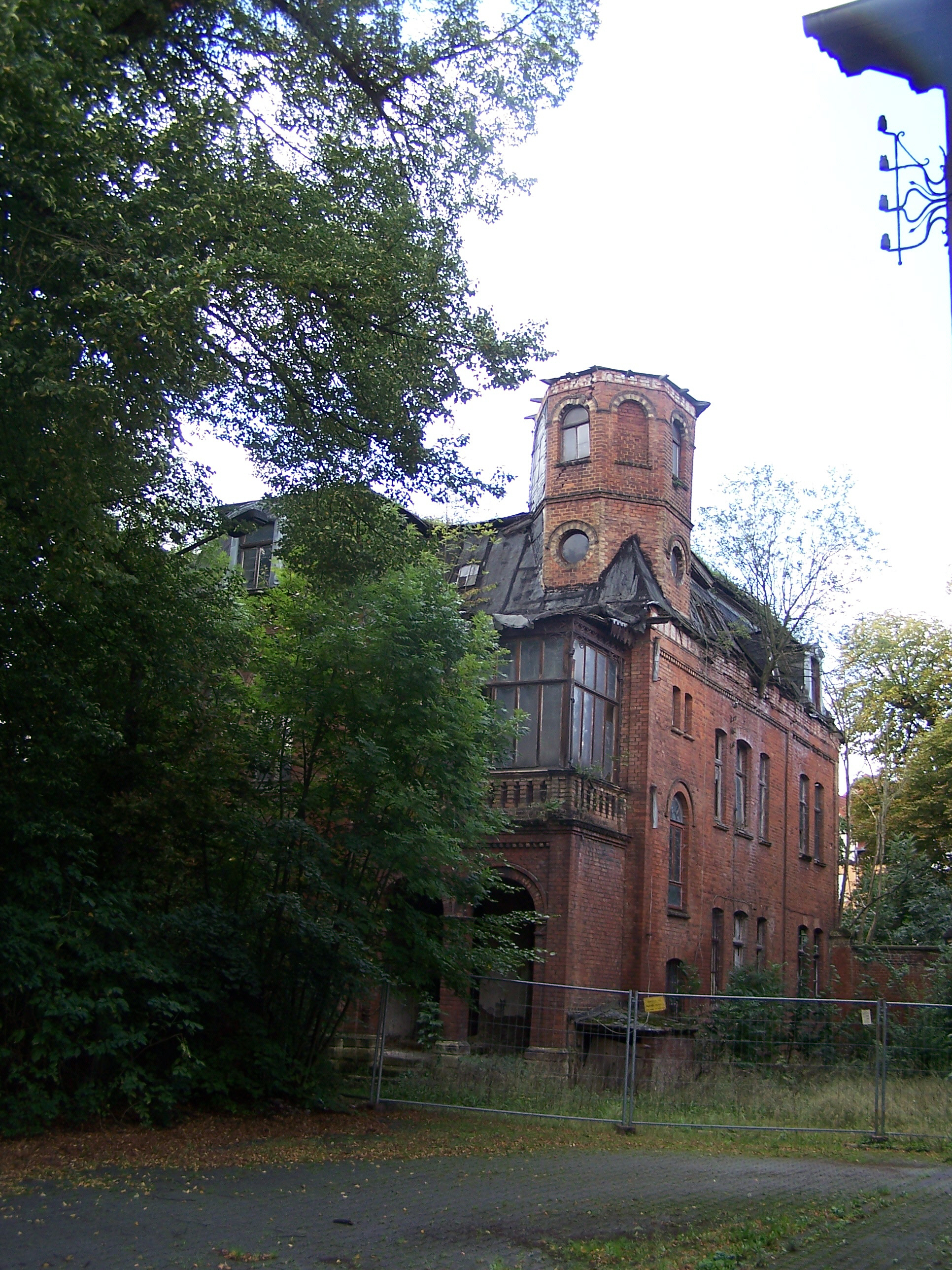 Die Ruine der Villa, noch als Kulturdenkmal verzeichnet, aber akkut einsturzgefährdet.